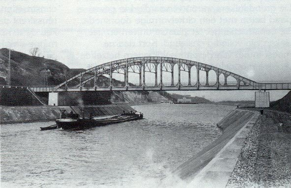 Eerste vierendeelbrug bij Ternaaien. Bouwjaar 1930 (foto uit 1935)